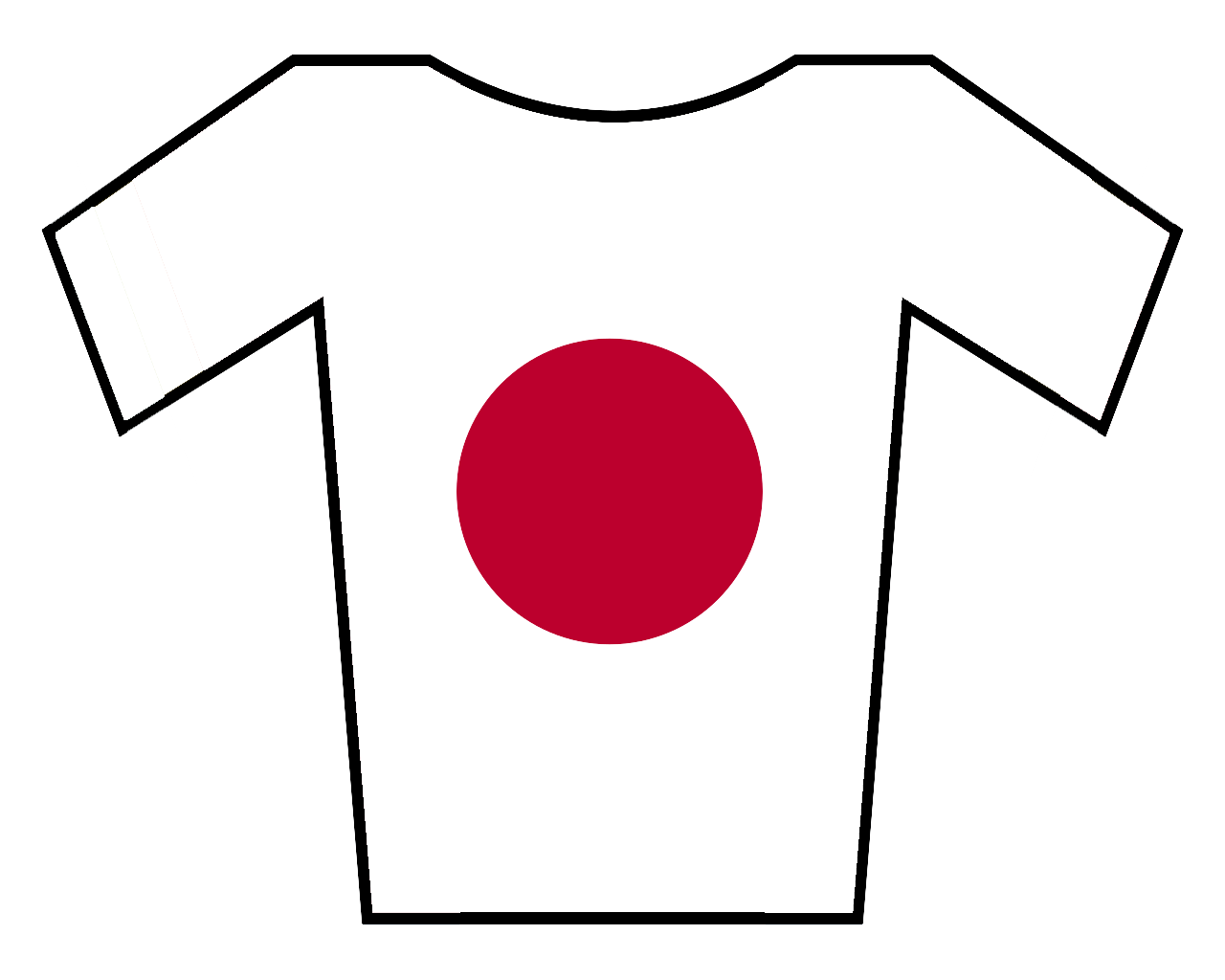 Maillot de Japón